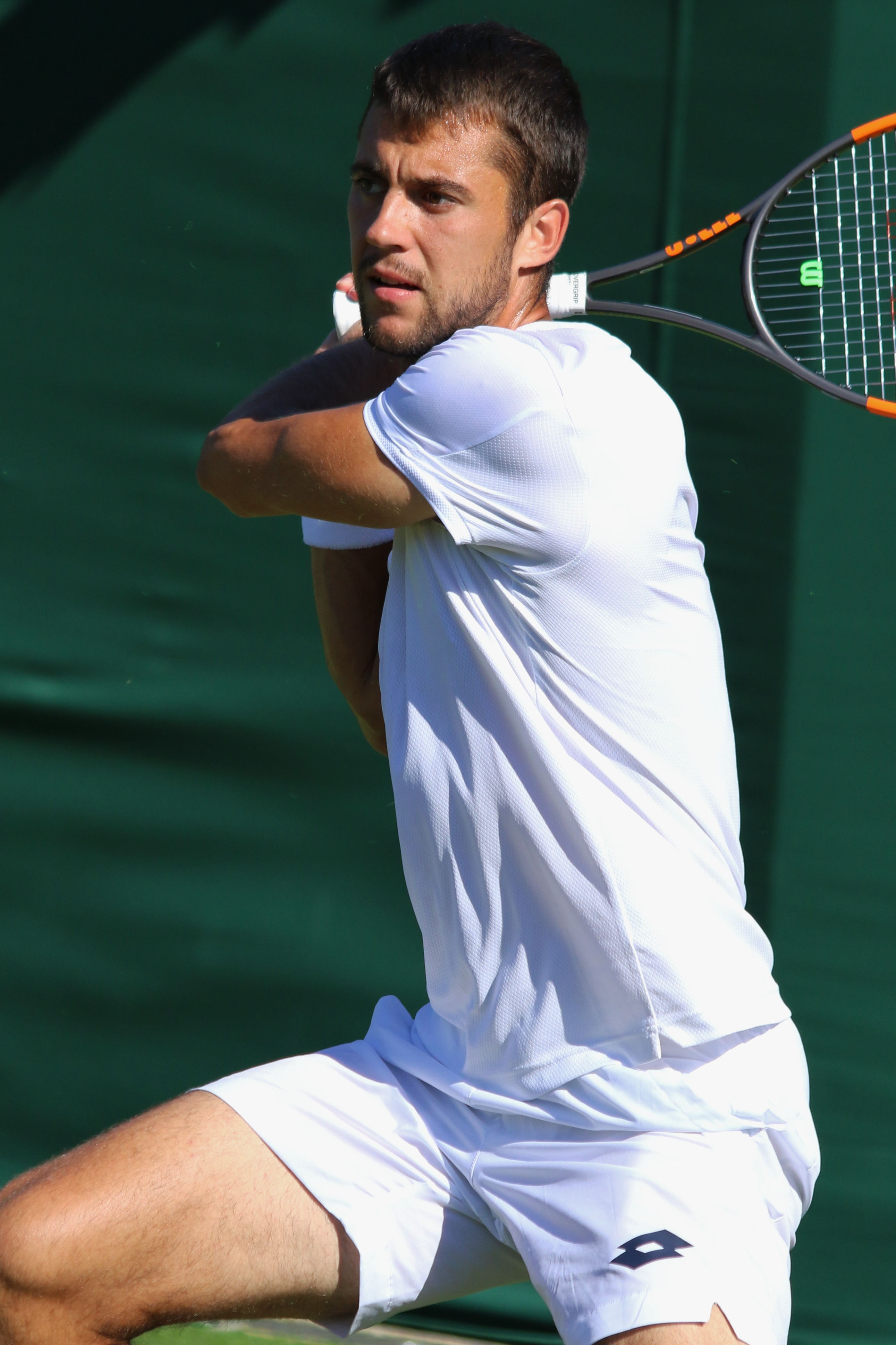 Djere WM18 (31)